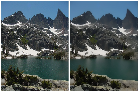 Originalfilter links, bilateral gefiltertes Bild rechts. Bild erzeugt mit selbst geschriebener Software